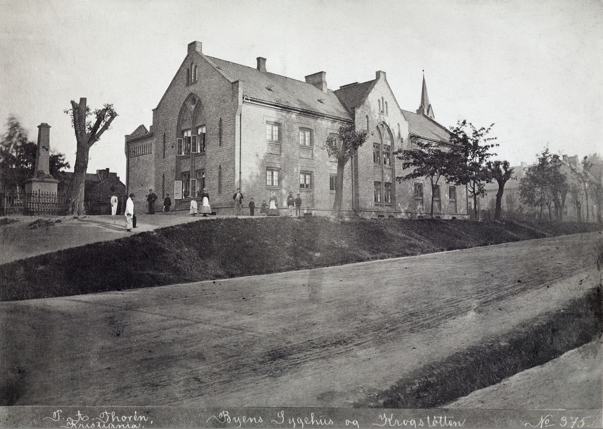 Krohgstøtten sykehus